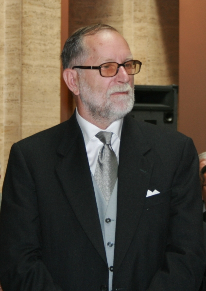 Nikola Kallay, svečano proglašenje i predstavljanje novih članova Hrvatske akademije znanosti i umjetnosti u Zagrebu